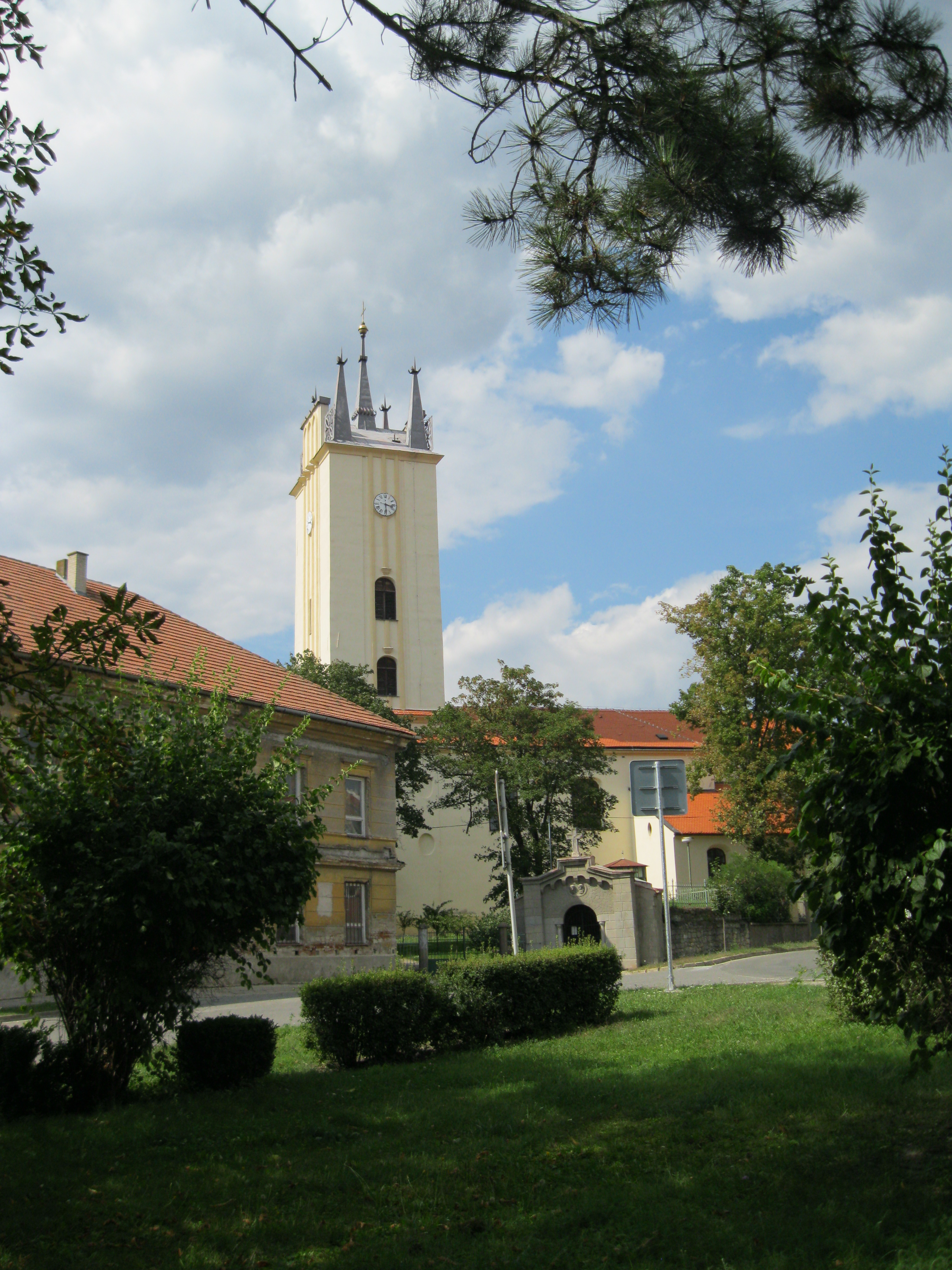 Kostel sv. Petra a Pavla (Podivín)